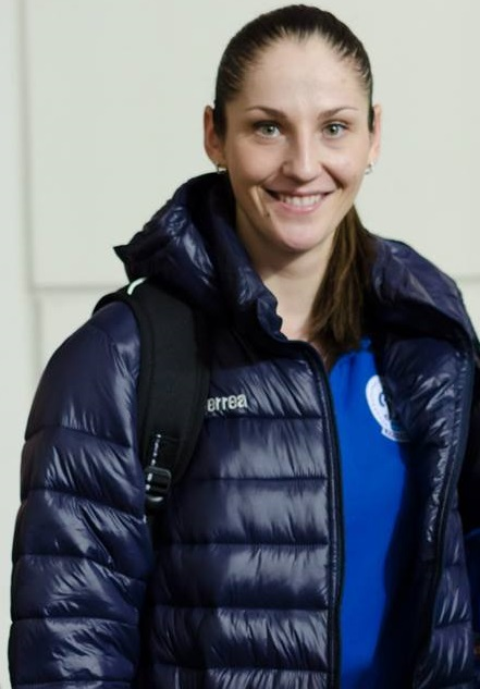 Pallavolista russa, gioca nel ruolo di schiacciatrice